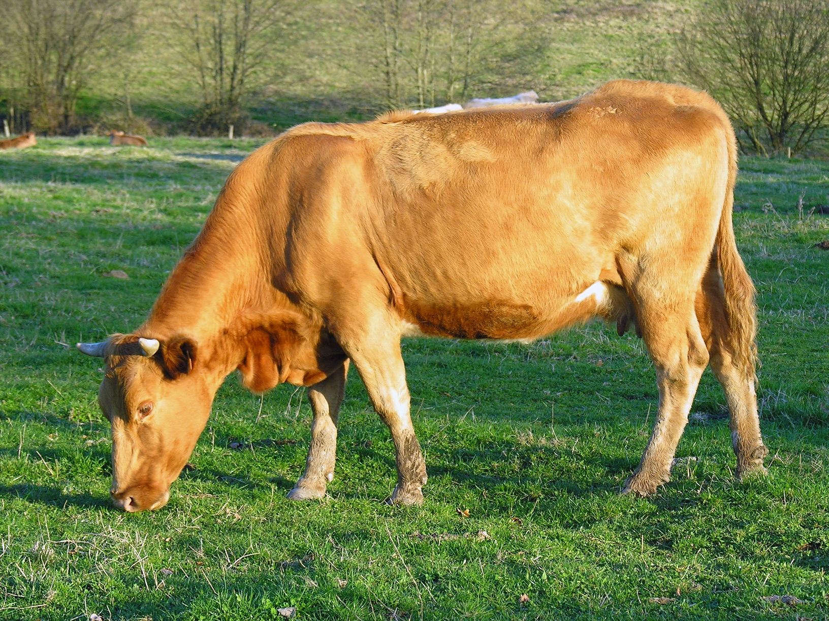 A Castañeda, Concello de Arzúa, Galiza